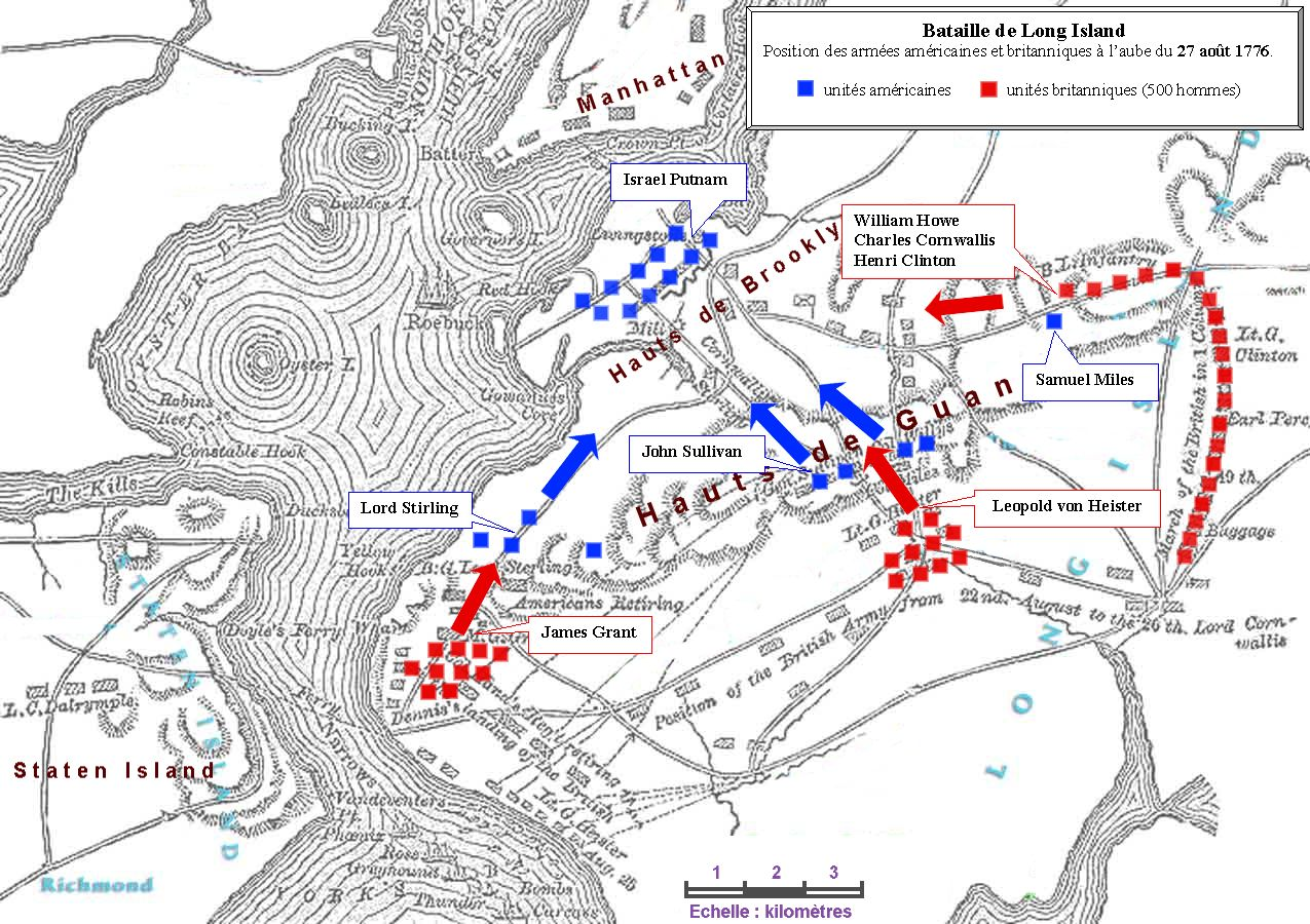 Carte de la Bataille de Long Island en 1776. Ajouts personnels effectués en mars 2004, sans copyright, sur fond de carte du domaine public. Carte issue de wiki en: publiée dans The Hessians and the other German Auxiliaries of Great Britain in the Revolutionary War par Edward J. Lowell (Harper and Brothers Publishers: New York, 1884)